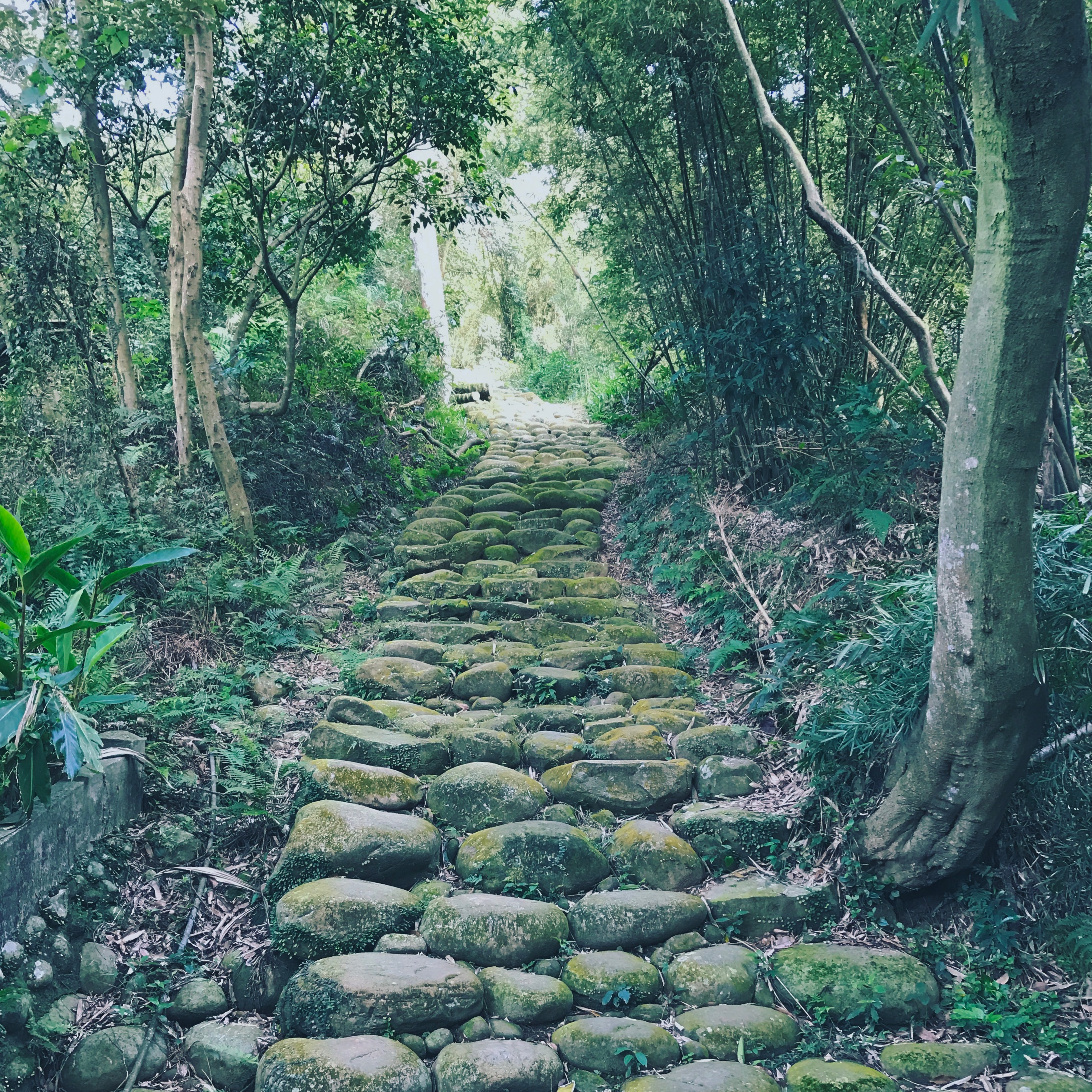 中文（台灣）: 湖口鄉漢卿步道